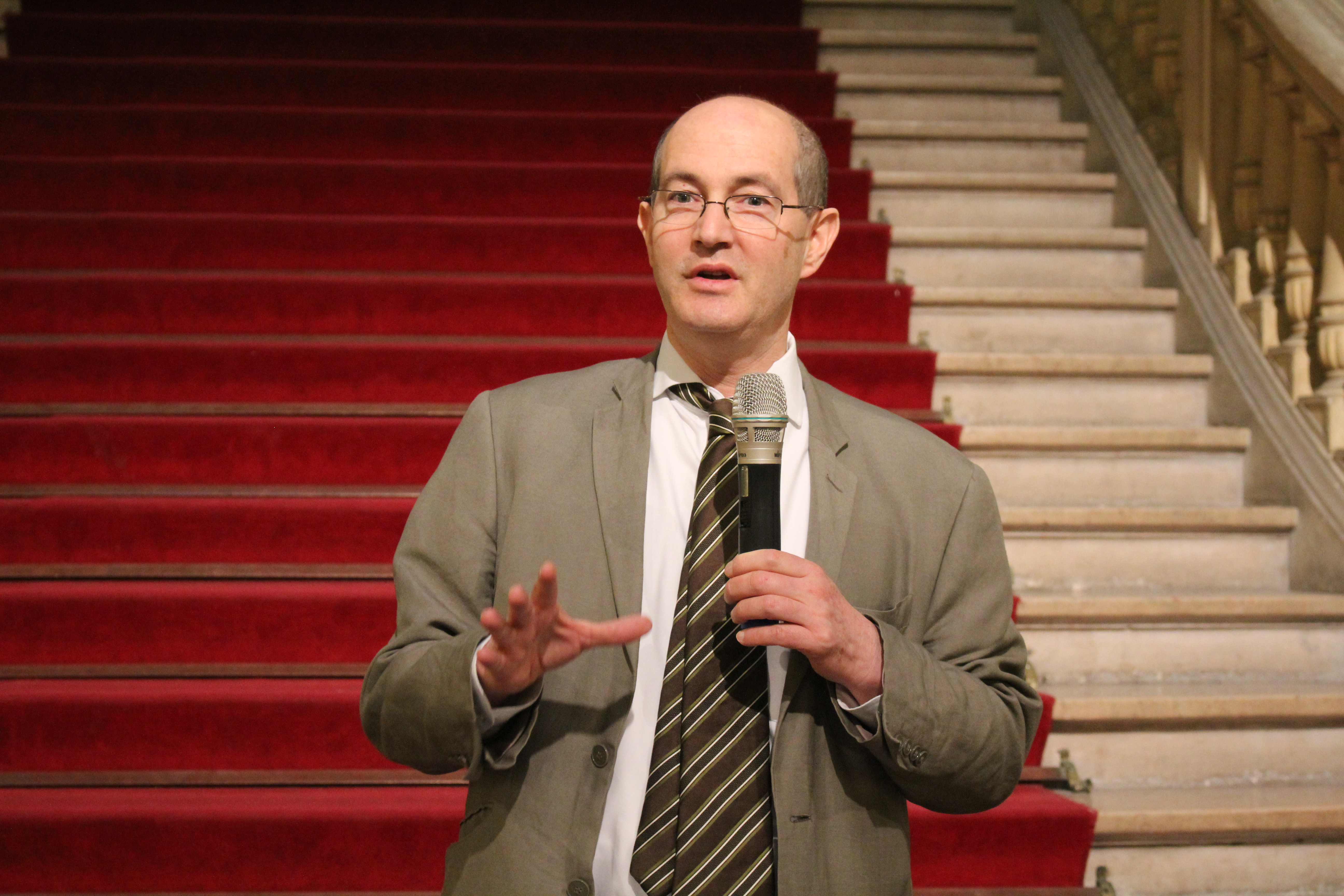 Bibliothèques Sans Frontières - Ideas Box à la Mairie du 10e, Paris.